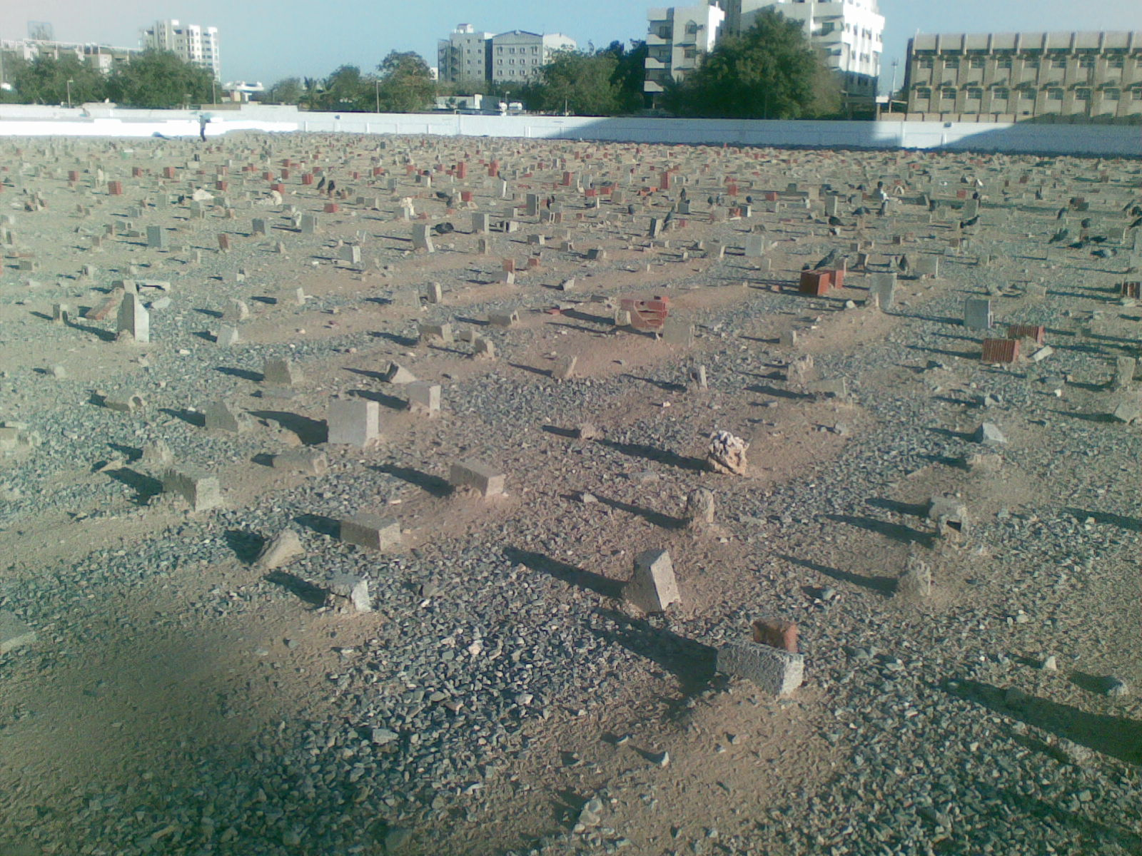 അൽ-റുവൈസ് ഖബര്സ്ഥാൻ, ജിദ്ദ